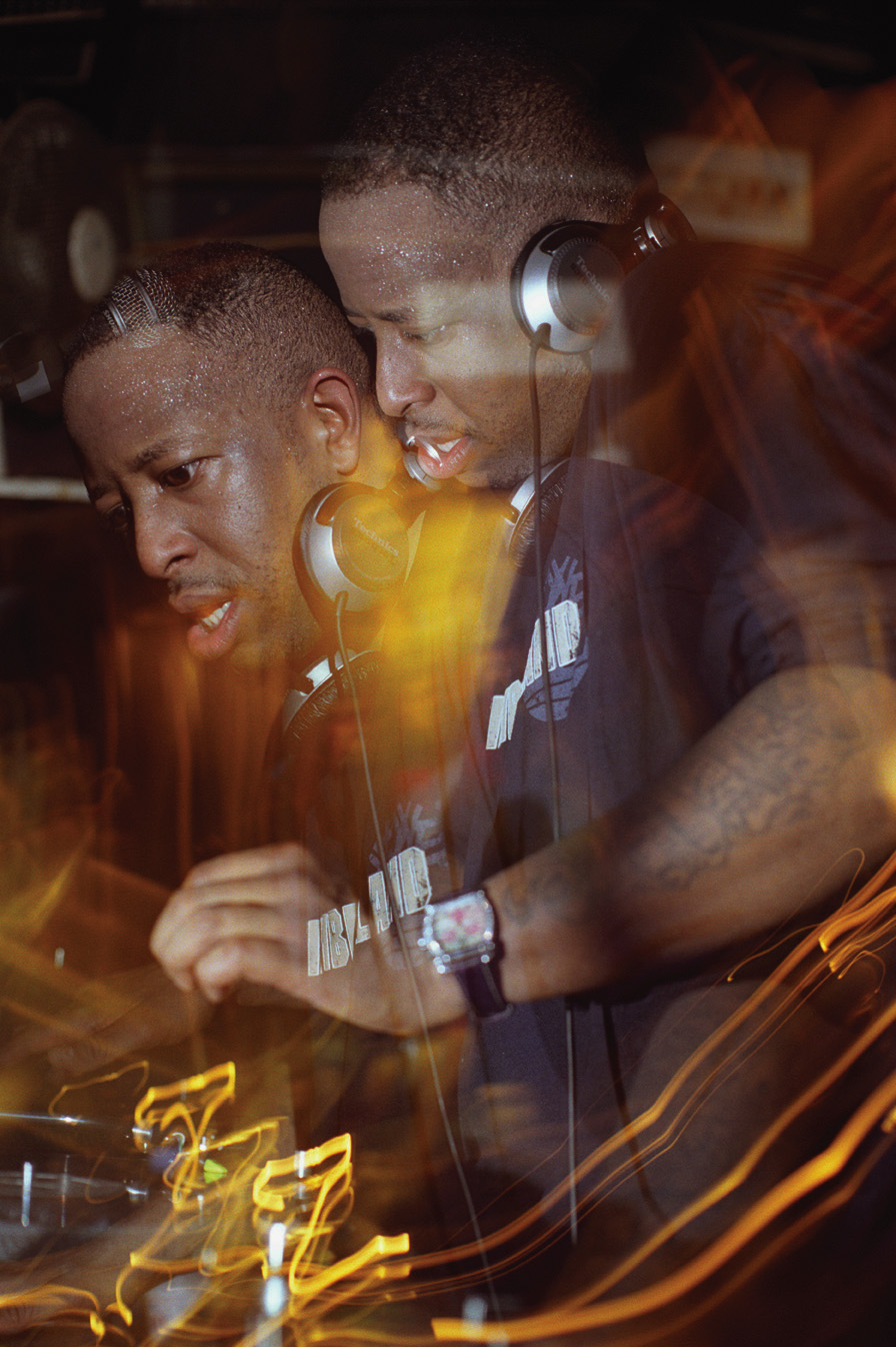 Dj Premier